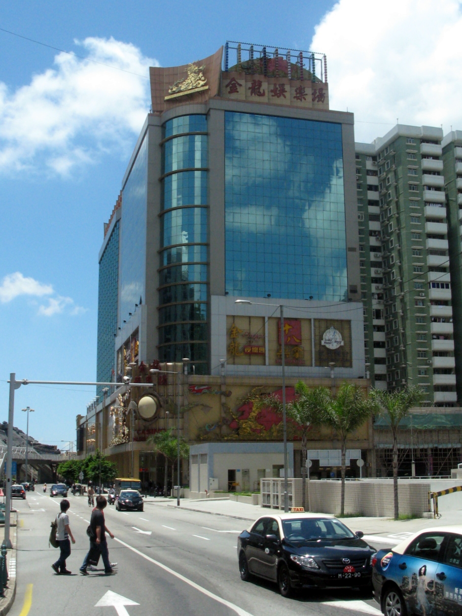 Hotel Golden Dragon Hotel Golden Dragon